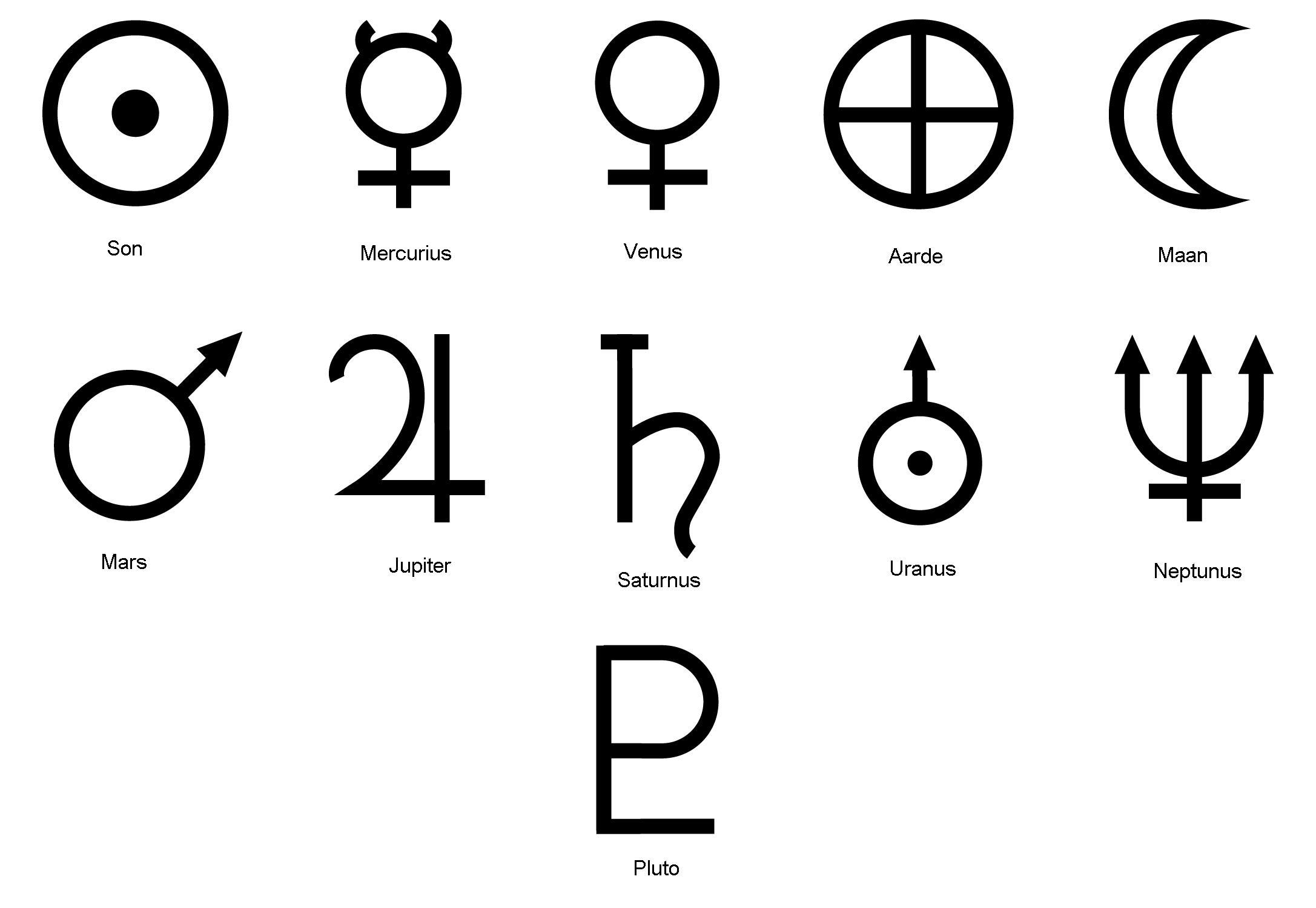 Sterrekundige simbole met Afrikaanse byskrifte.